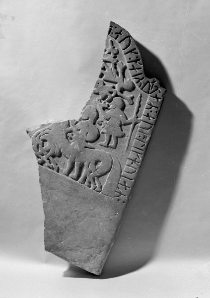 Del av bildsten, 1000-tal, påträffad vid restaurering 1900-1902. G 114. Kategori: (09) Runstenar, bildstenar Del av bildsten, 1000-tal, påträffad vid restaurering 1900-1902. G 114.